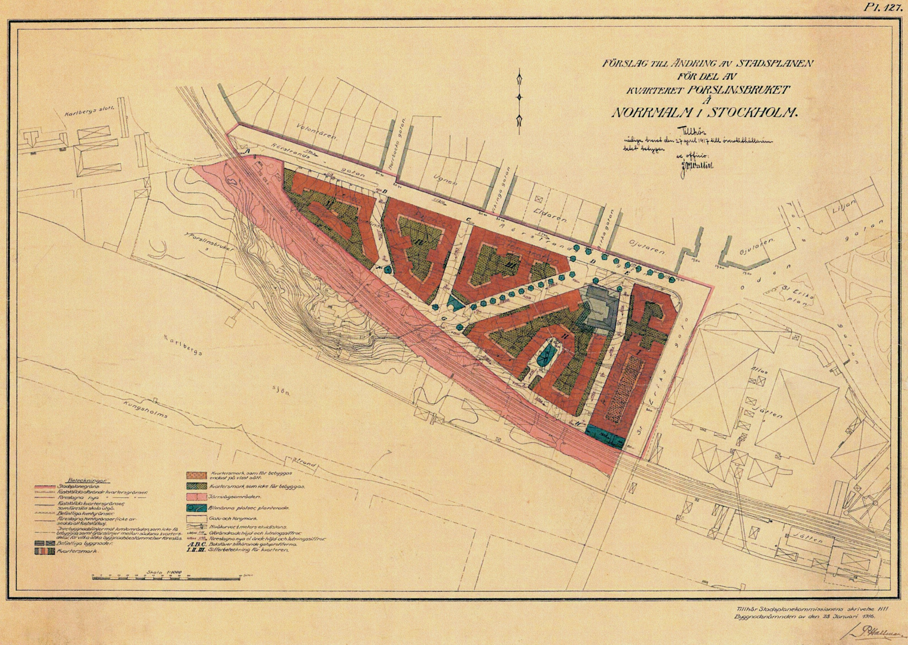 Rörstarndsområdet i Stockholm, kv Porslinsbruket